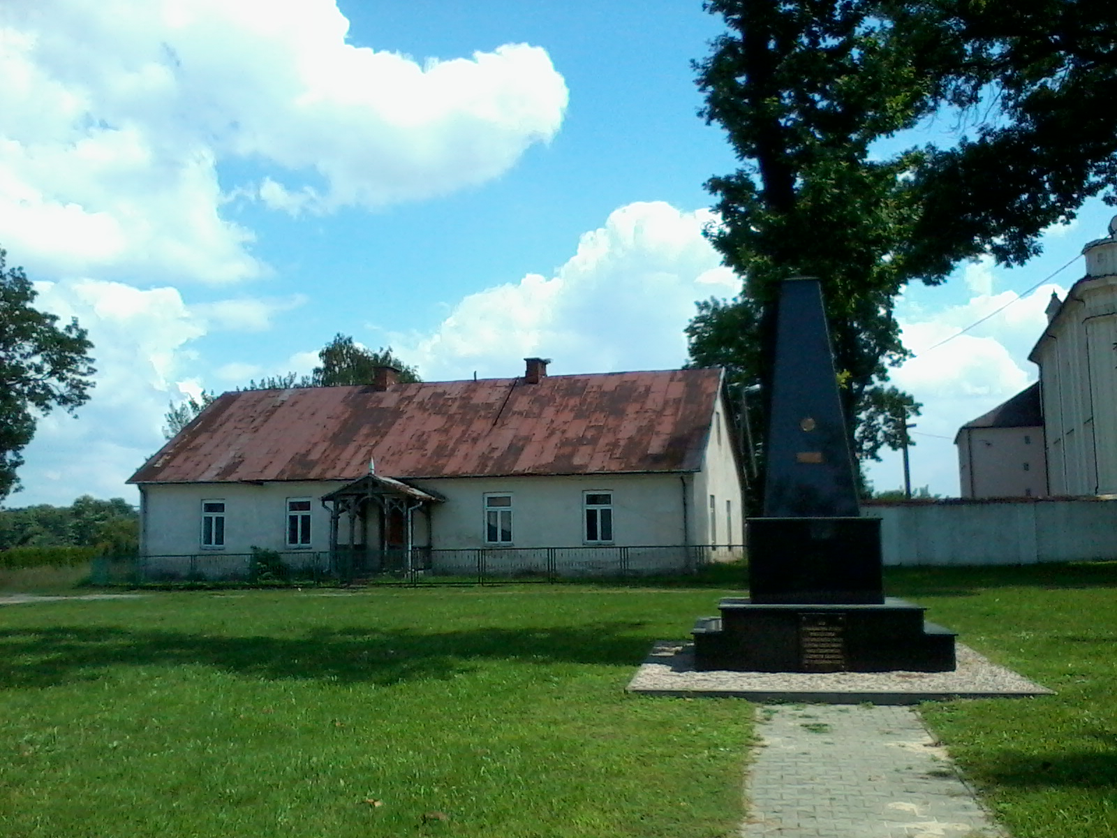 Baranów - pomnik Józefa Piłsudskiego, lipiec 2014